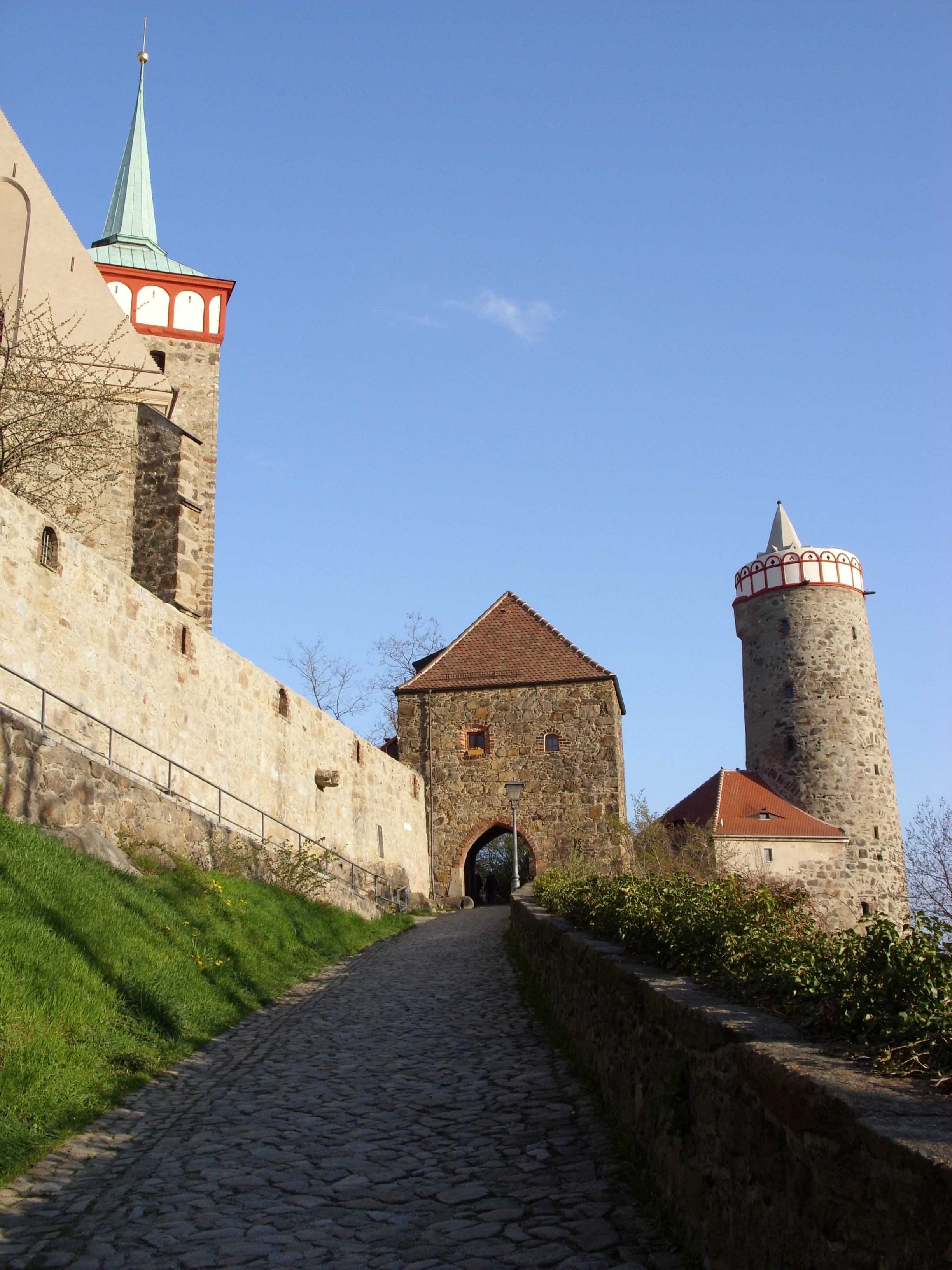 Michaeliskirche, Mühltor und Alte Wasserkunst (von links nach rechts) in Bautzen, Ansicht vom Eselsberg.